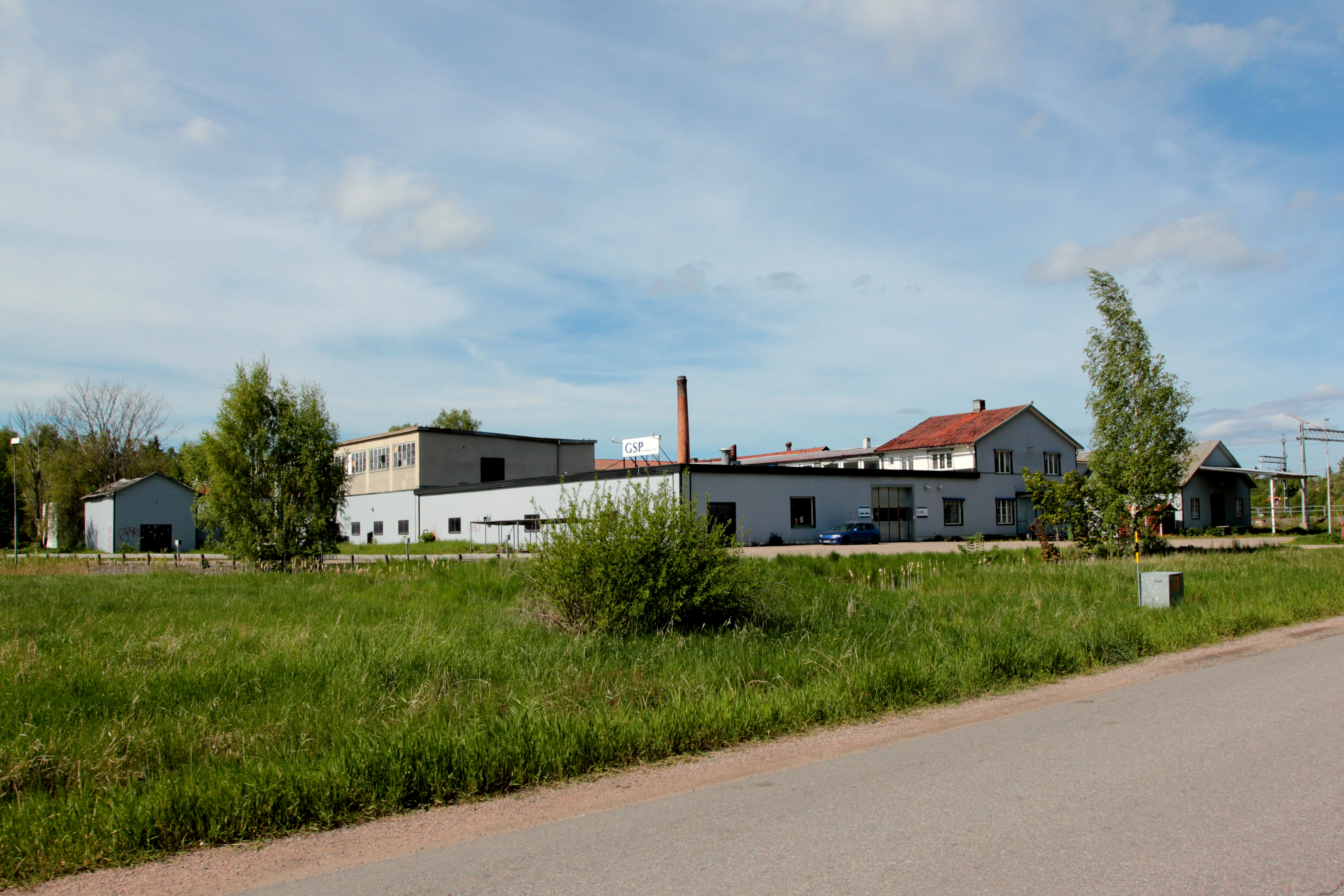 Industribyggnad i Örbyhus, ursprungligen Smides-& Järnsängsfabriks AB (dotterbolag till AB Sängfabriken), endast delar av den ursprungliga byggnaden bevarad. Foto uppladdat som en del i Bergslagssafarin 26 maj 2012.